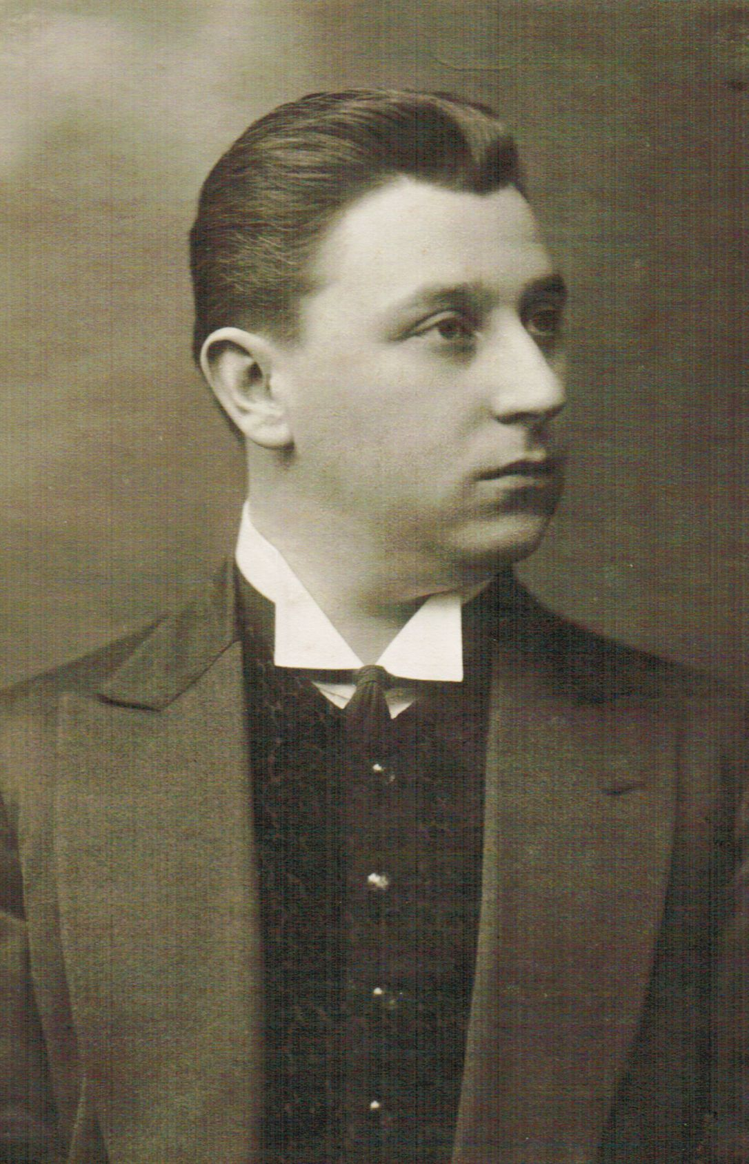 Eine Photographie vonm Friedrich Haag um 1920